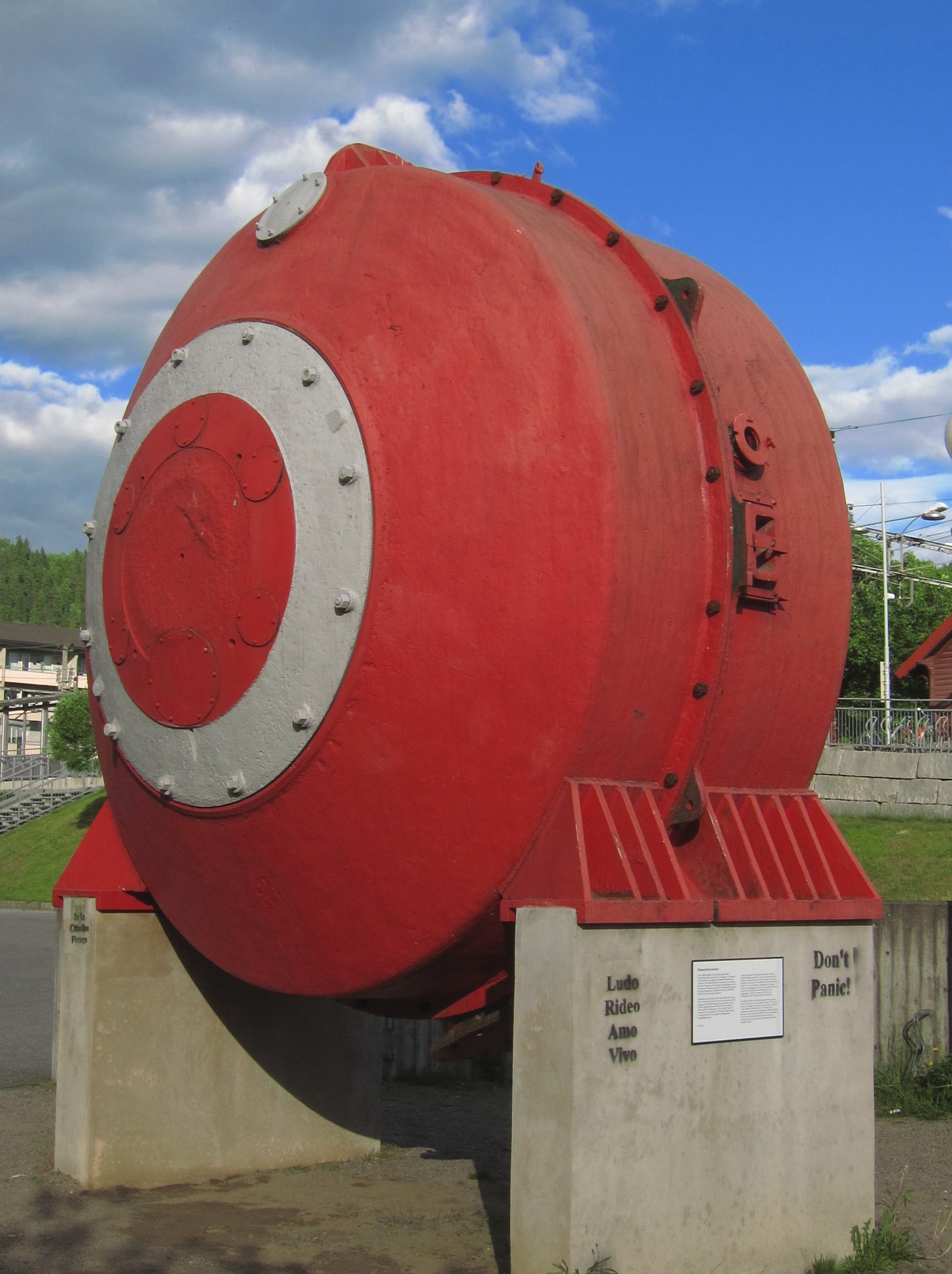 Birkeland-Eyde lysebueovn utenfor Norsk teknisk museum på Kjelsås. Lysbueovn brukt til fremstilling av kunstgjødsel ved å utvinne nitrogen. Utviklet av Sam Eyde og Kristian Birkeland. Ovnen på bildet er blant de største, kapasitet på 3300 kW. Brukt på Rjukan 1916-1940.